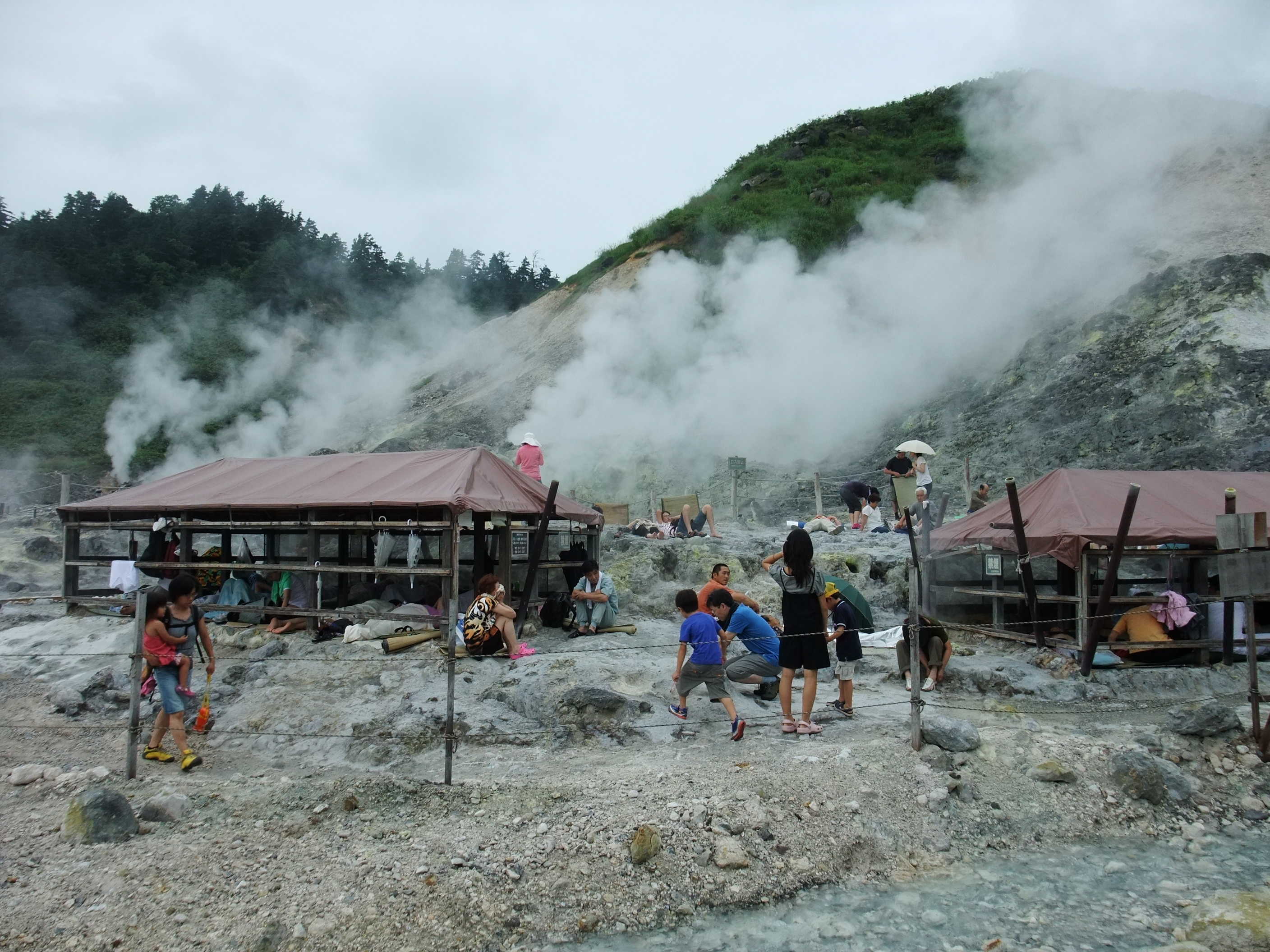 玉川温泉